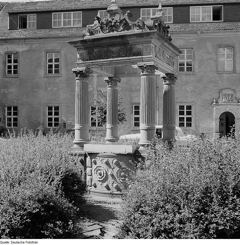 Original image description from the Deutsche Fotothek Wiesenburg (Kreis Belzig). Schloss Wiesenburg, Innenhof mit Brunnen